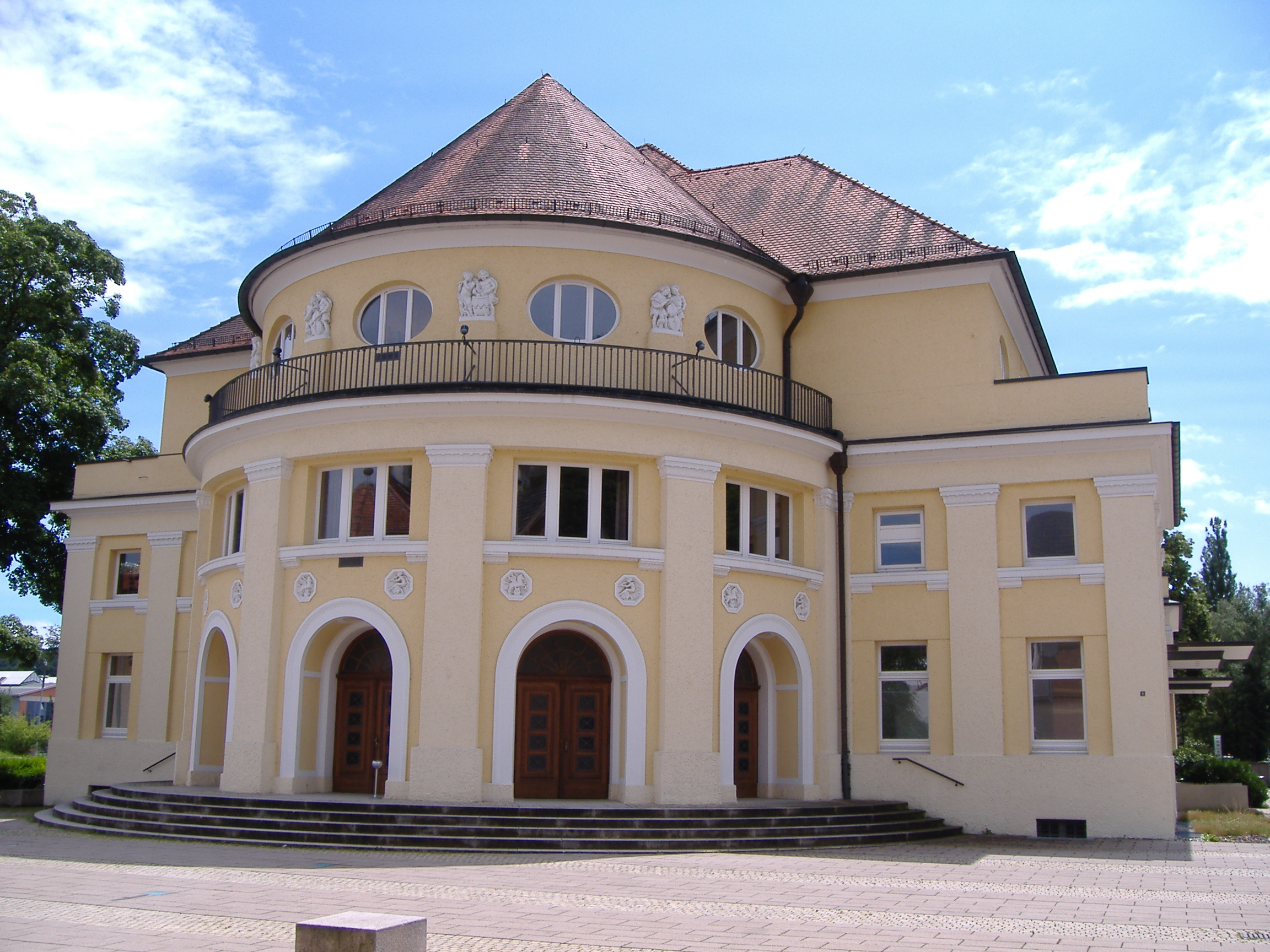 Konzerthuas Heidenheim